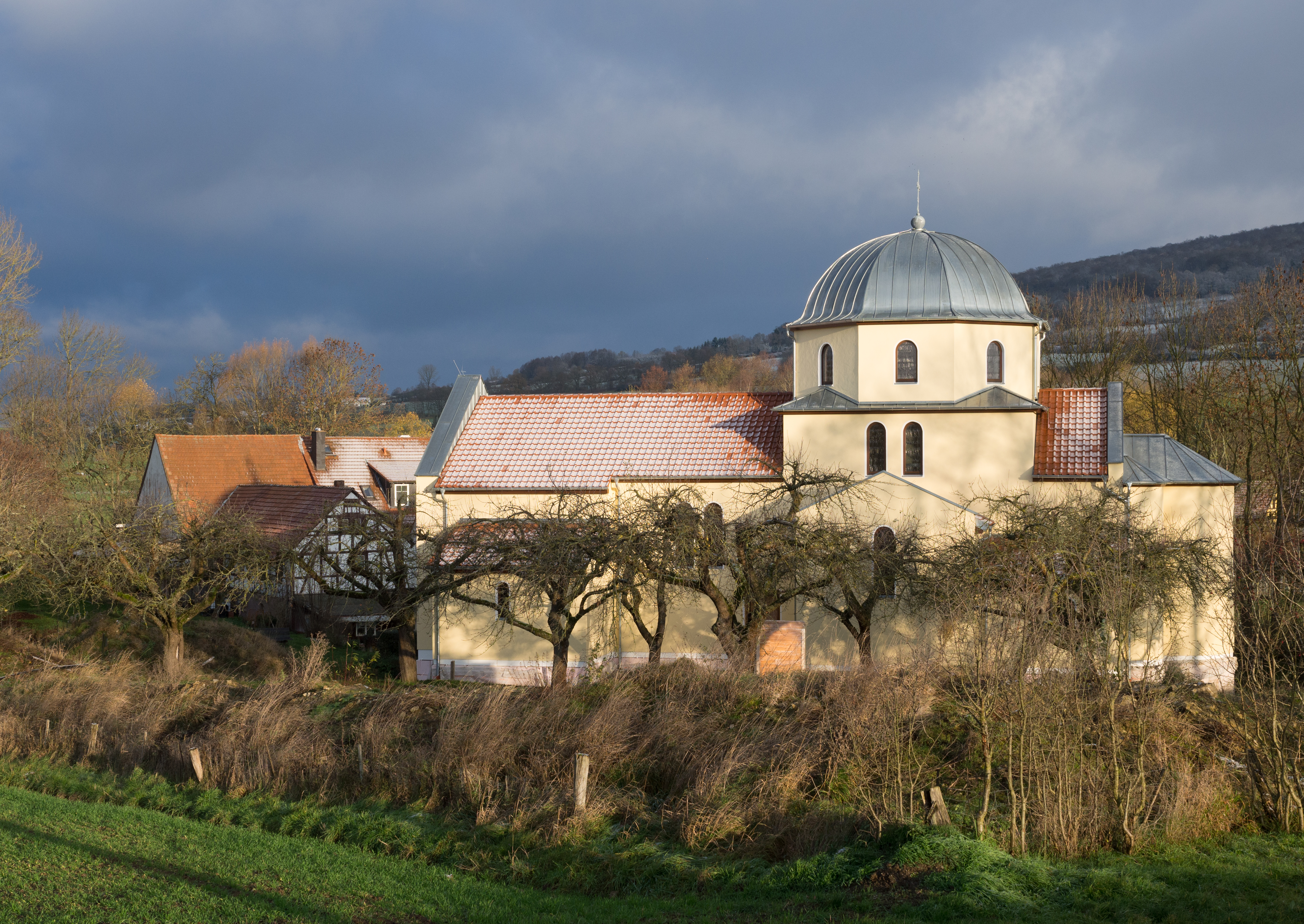 Die im Jahr 2015 neu erbaute Kirche des serbisch orthodoxen Klosters in Unterufhausen